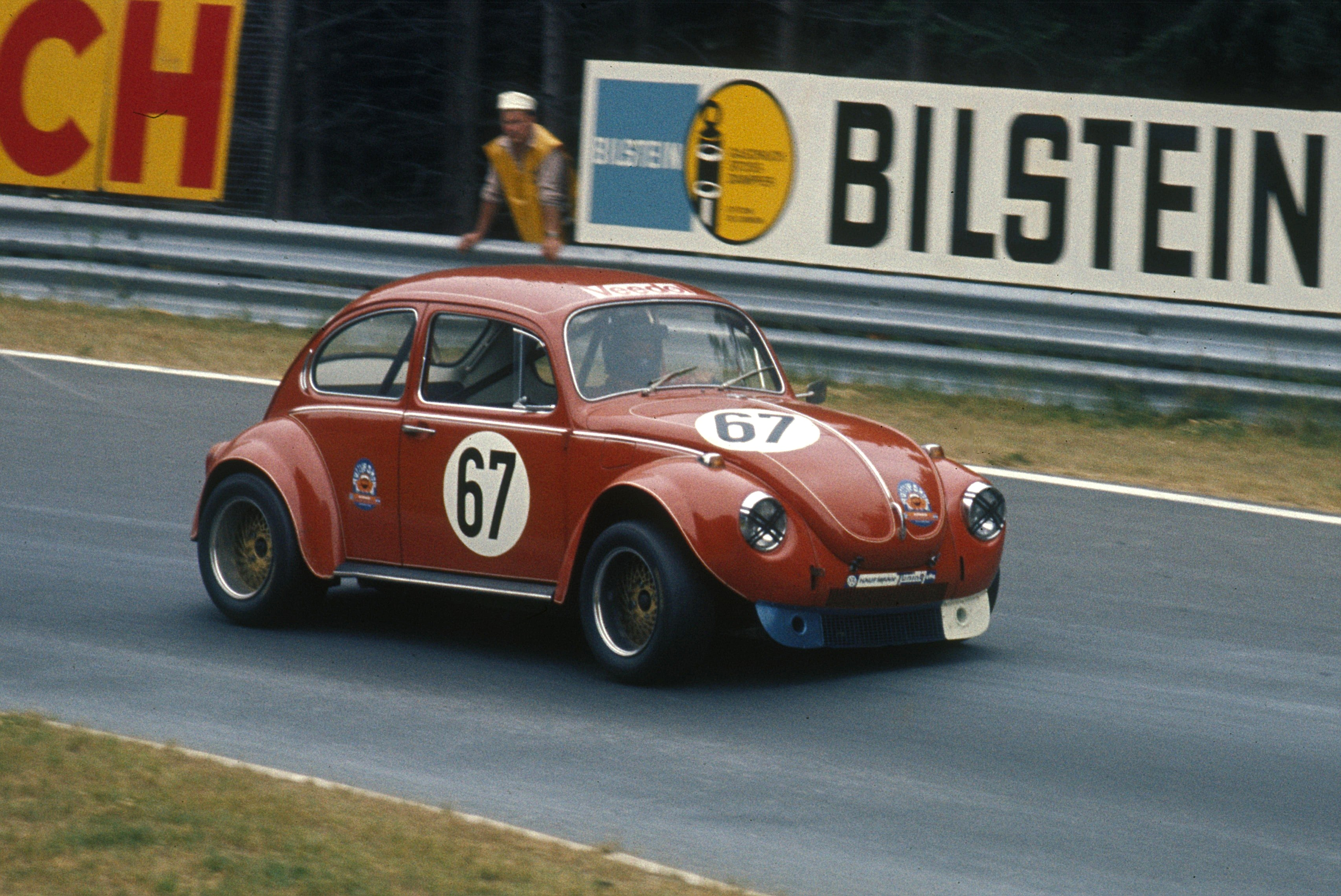 VW 1302 von Dieter Götting beim 6-Stunden-Rennen auf dem Nürburgring. 1584 cm³, 158 PS bei 7200/min, Höchstgeschwindigkeit auf dem Nürburgring: 205 km/h; Fahrer auf dem Bild: Werner Rohr